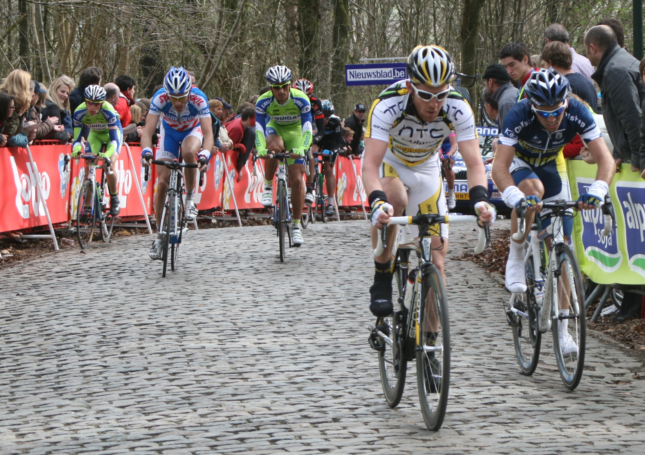 Tiziano Dall'Antonia, Daniele Bennati, Matthew Goss, sur le mont Kemmel, lors de Gand-Wevelgem 2010